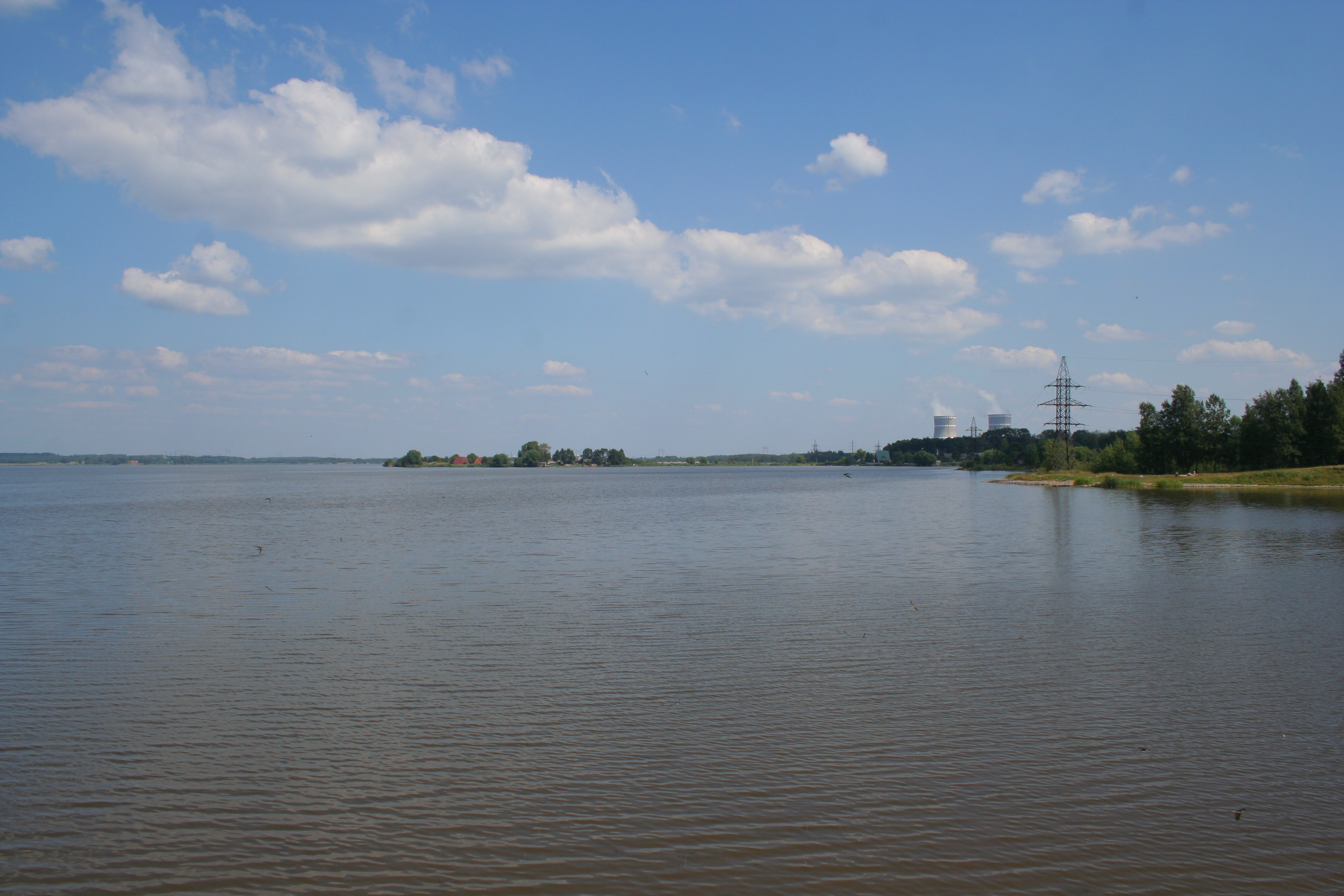 Stadt Udomlja (Oblast Twer, Russland). Blick auf den Peswo-See.